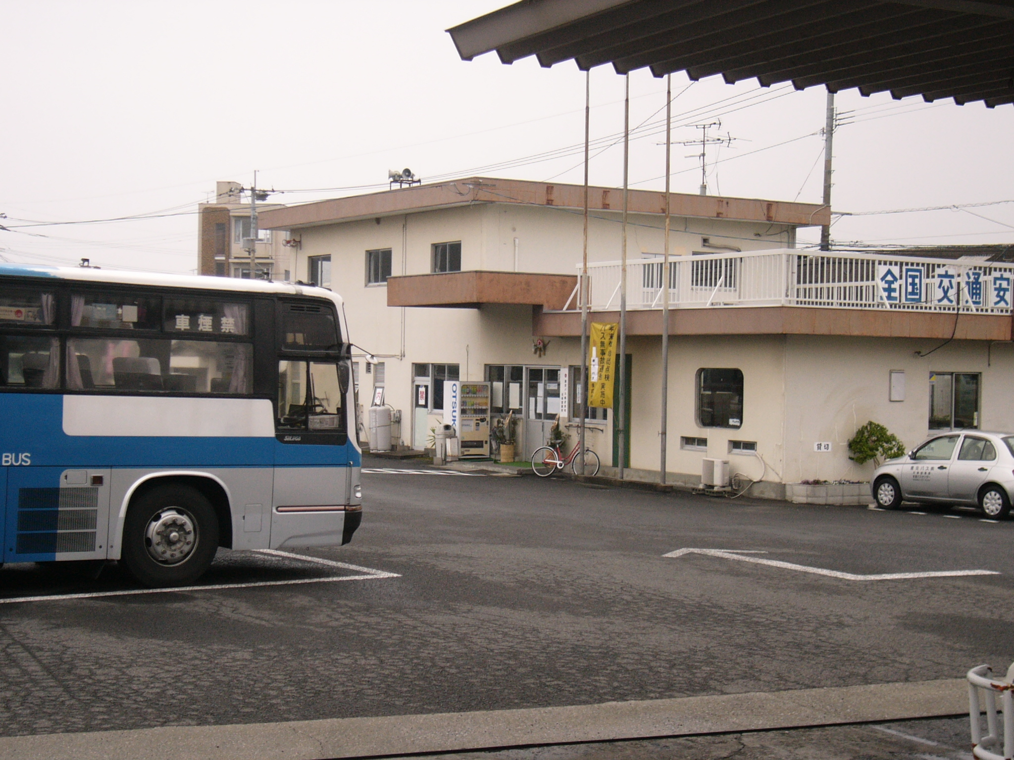 産交バス天草営業所（敷地外からの撮影）